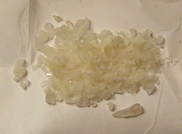 1 Gramm reines MDMA•HCl / 1 gramm pure MDMA•HCl